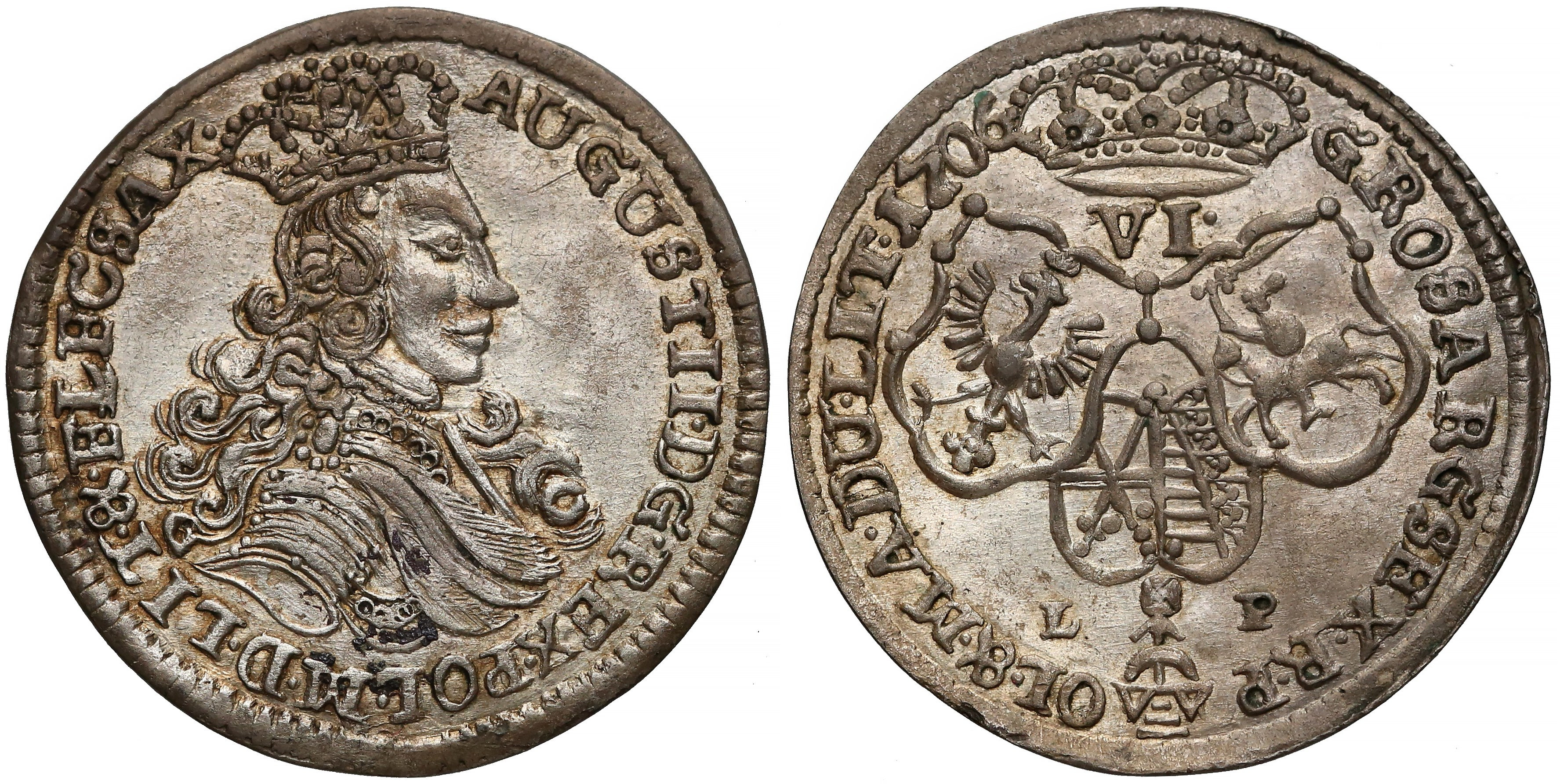 Szóstak 1706 ludu płacz